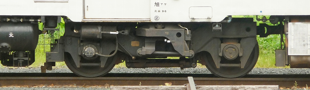 JR北海道キハ40形気動車(キハ40 830)のDT44形台車 石北本線網走駅で撮影